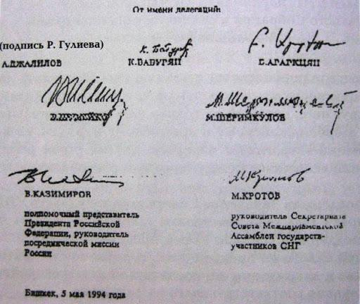 Скан подписей под Бишкекским протоколом